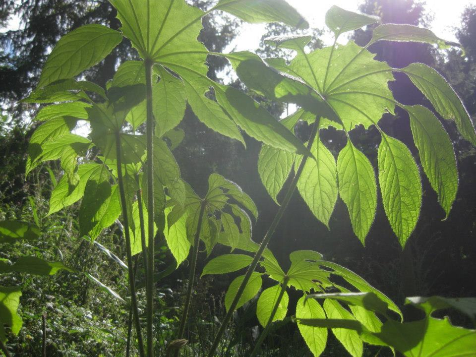 Brassaiopsis mitis CHB&CM08SIK87